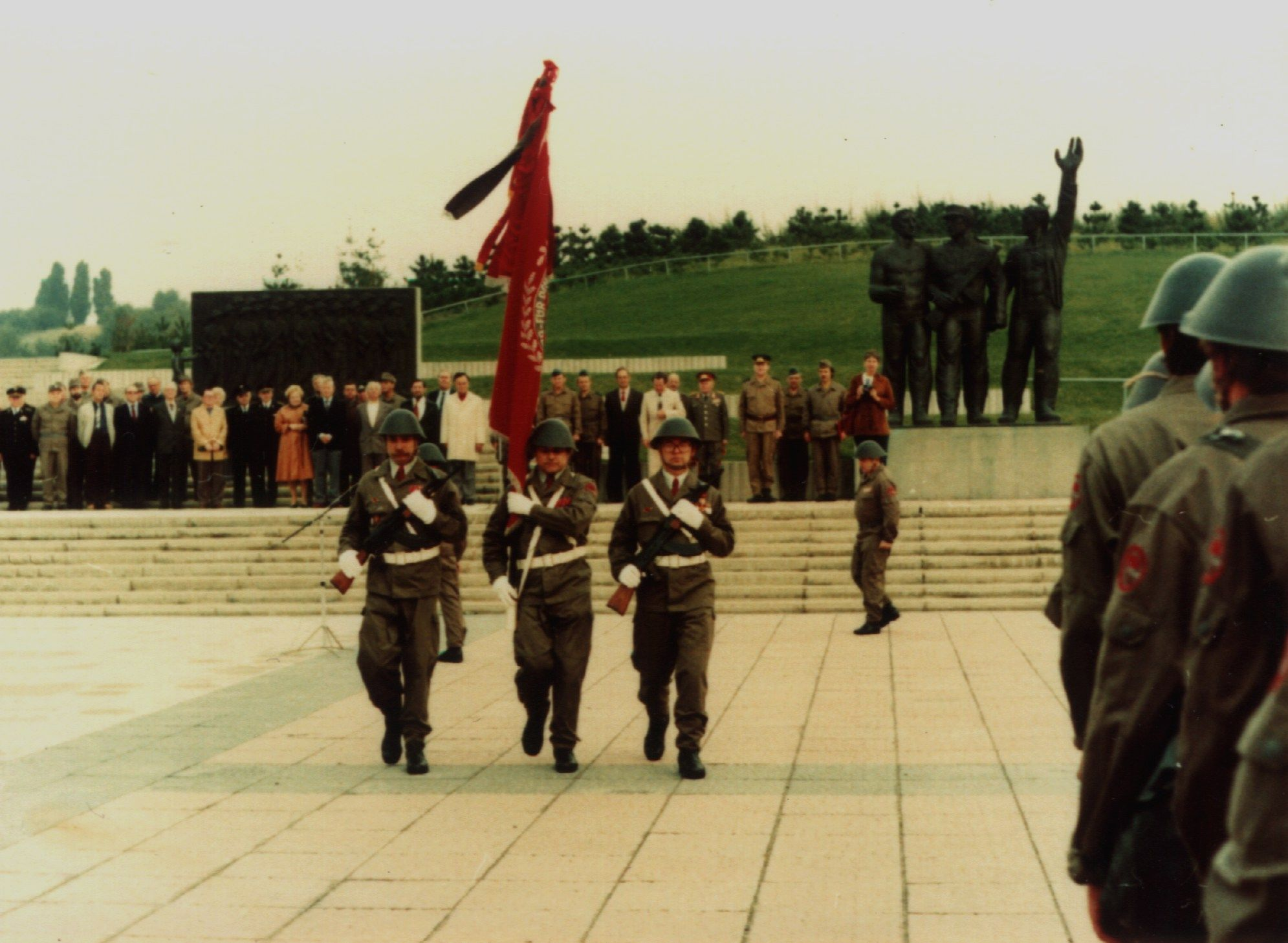 Das ehemalige Kampfgruppendenkmal am Volkspark Prenzlauer Berg bei einem Ehrenappell im August 1989